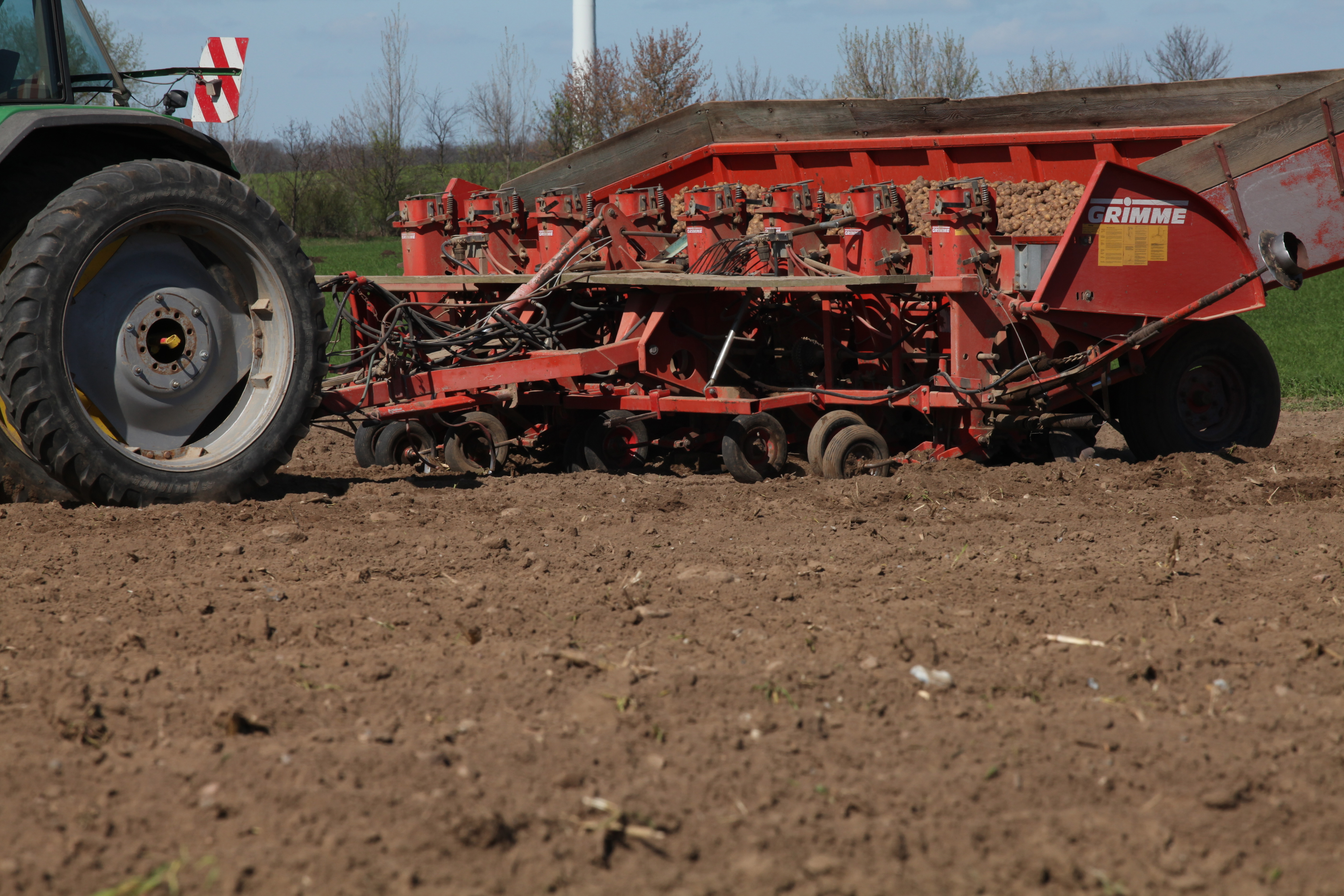 Auspflanzung der Amflora im Frühjahr 2010 in Mecklenburg-Vorpommern: Im April 2010 wurde Amflora erstmalig für die kommerzielle Nutzung auf rund 15 Hektar in Deutschland angebaut. Amflora ist die erste gentechnisch optimierte Pflanze, die seit 1998 in der EU eine kommerzielle Anbau-Zulassung erhalten hat. BASF-Forscher haben die Kartoffel gemeinsam mit Experten der Stärkeindustrie entwickelt, um technische Anwendungen zu erleichtern.